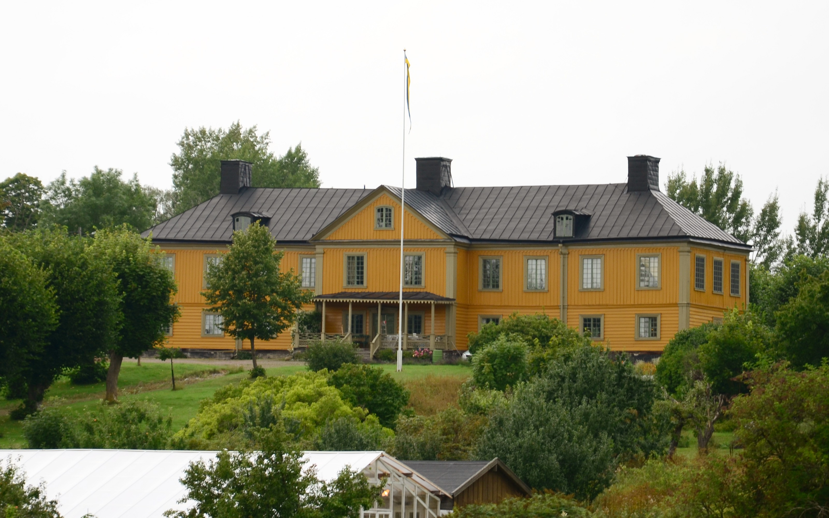 Boo gård på Värmdön utanför Stockholm.